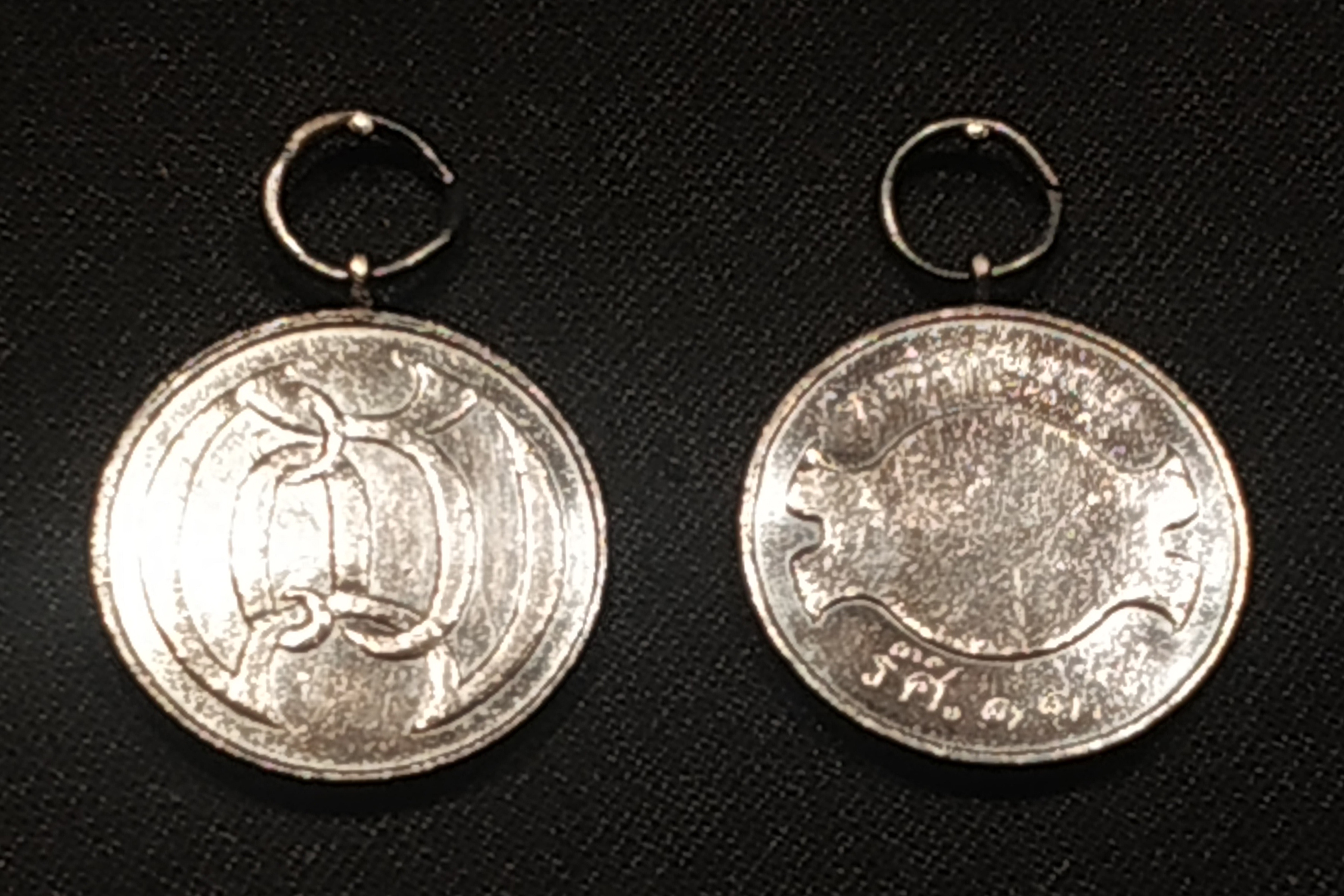 เหรียญราชินี เป็นเหรียญที่สมเด็จพระนางเจ้าเสาวภาผ่องศรี พระบรมราชินีนาถ (สมเด็จพระศรีพัชรินทราบรมราชินีนาถ พระบรมราชชนนีพันปีหลวง) ทรงพระกรุณาโปรดเกล้าฯ ให้สร้างขึ้นโดยได้รับพระราชทานพระบรมราชานุญาตจากพระบาทสมเด็จพระจุลจอมเกล้าเจ้าอยู่หัว เพื่อพระราชทานเป็นที่ระลึกแก่ผู้ปฏิบัติงานในระหว่างทรงปฏิบัติหน้าที่ผู้สำเร็จราชการแทนพระองค์ เมื่อ พ.ศ. 2440 บันทึกภาพจากพิพิธภัณฑ์เหรียญกษาปณานุรักษ์ ถนนจักรพงษ์ เขตพระนคร กรุงเทพมหานคร ประเทศไทย เมื่อวันที่ 29 กุมภาพันธ์ พ.ศ. 2563